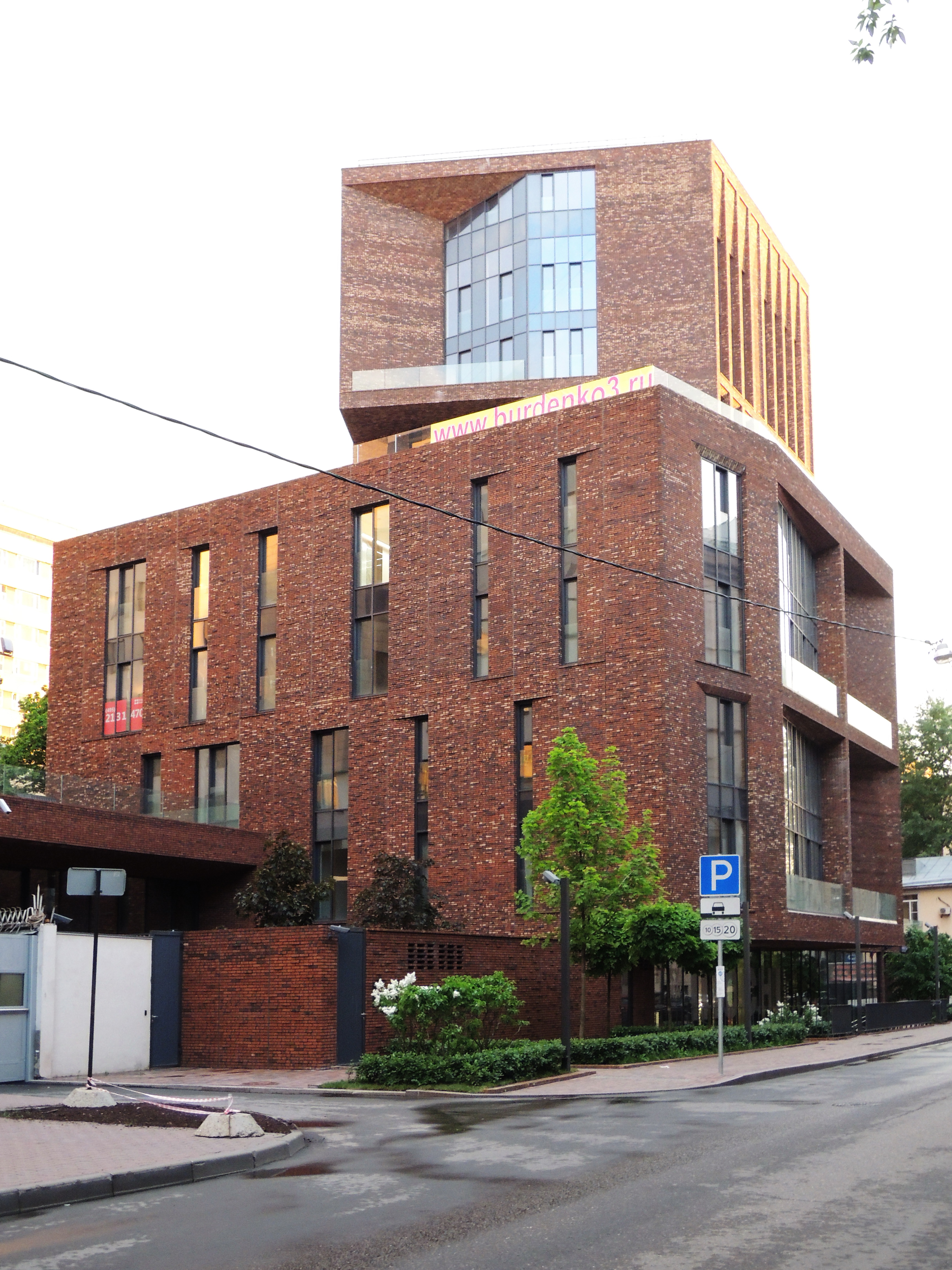 Burdenko Street